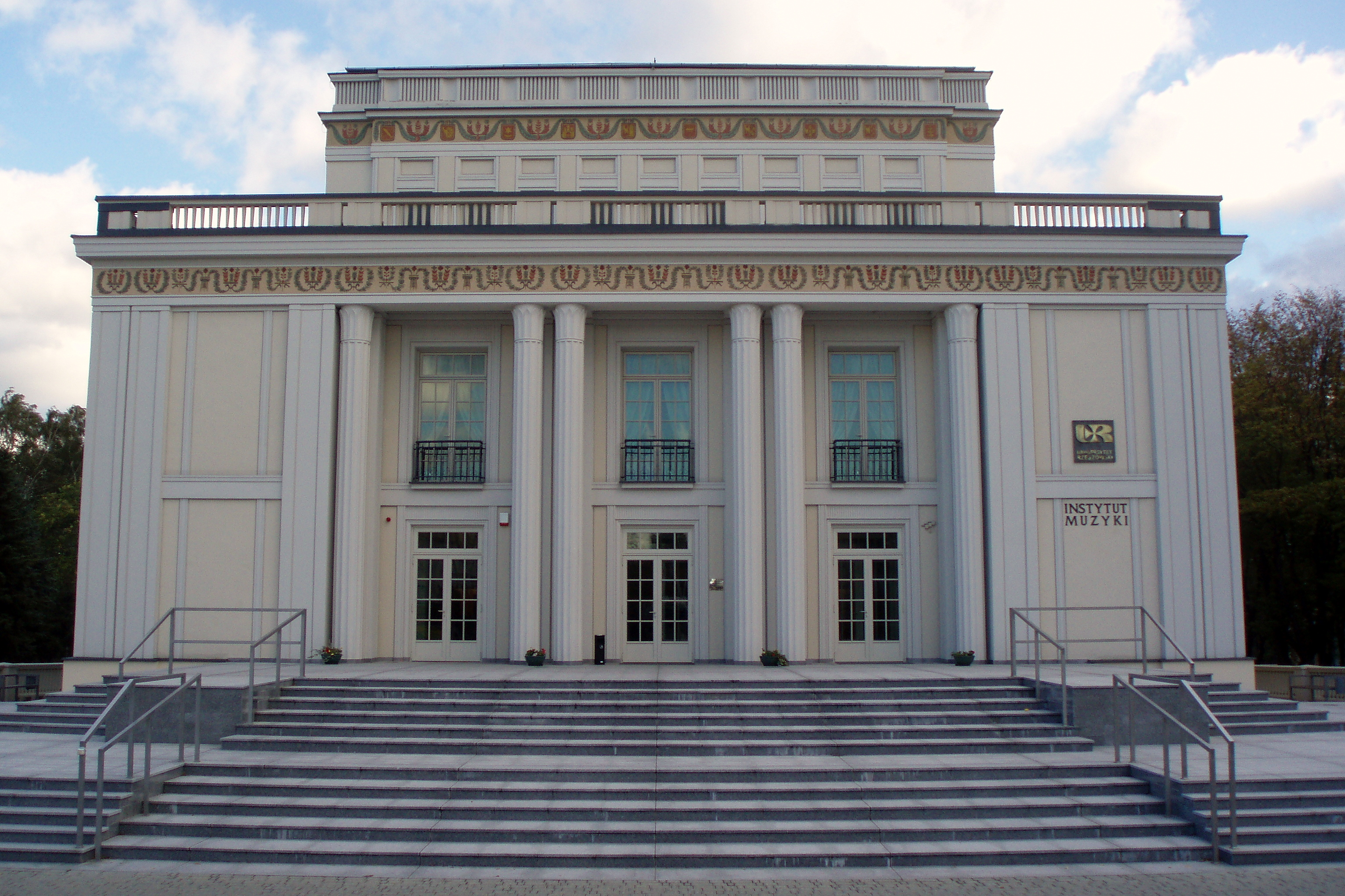 Rzeszów, ul. Dąbrowskiego 83 - budynek dawnego Domu Kultury WSK, obecnie instytut muzyki